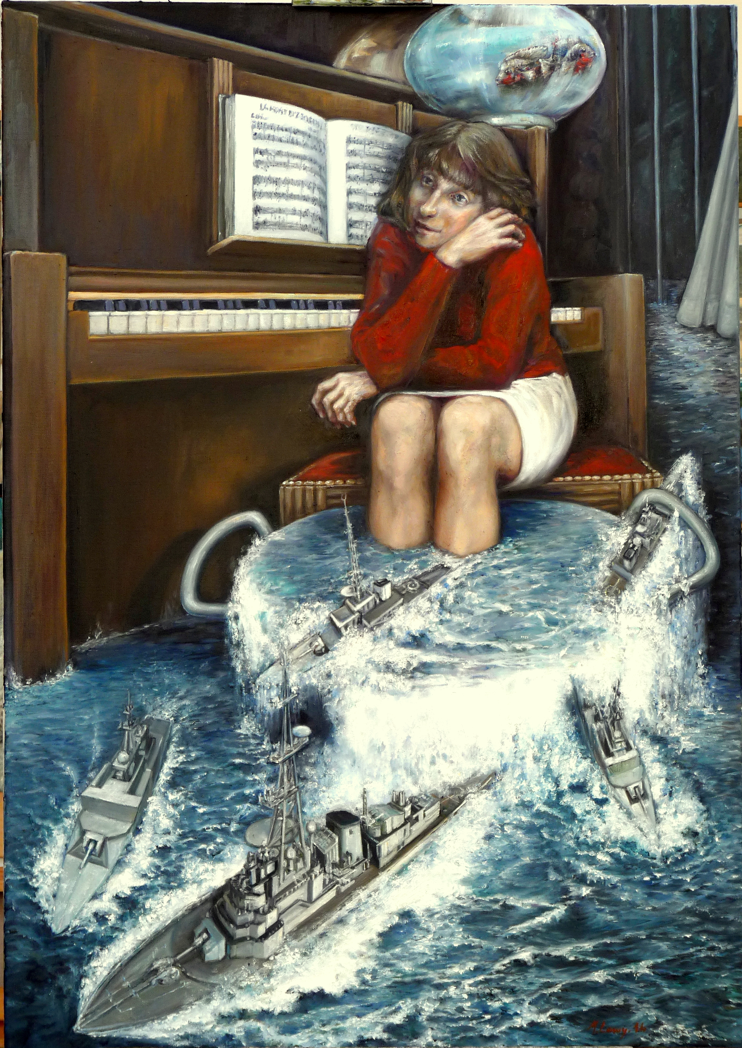 Huile sur toile